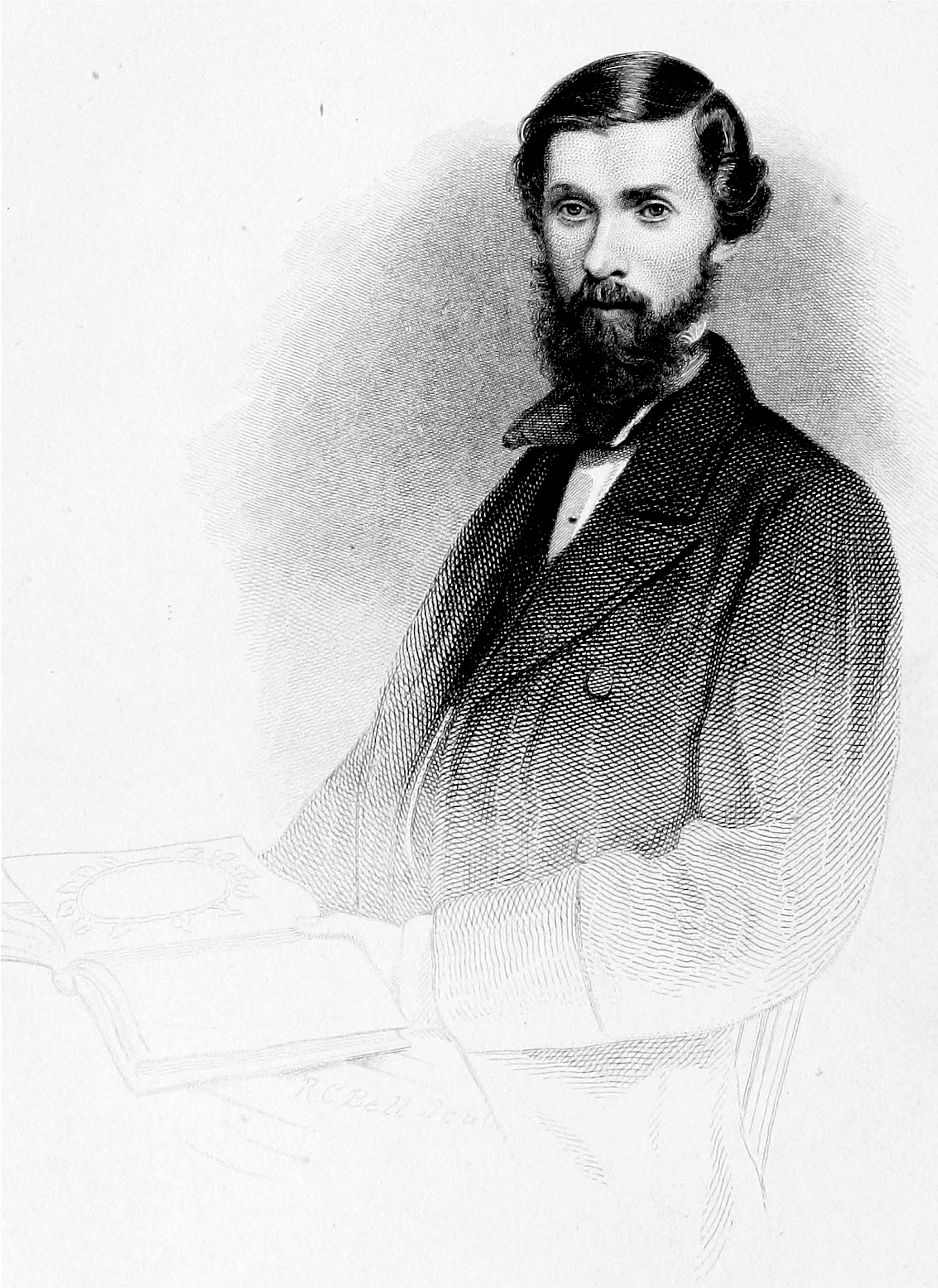 Engraving after photograph